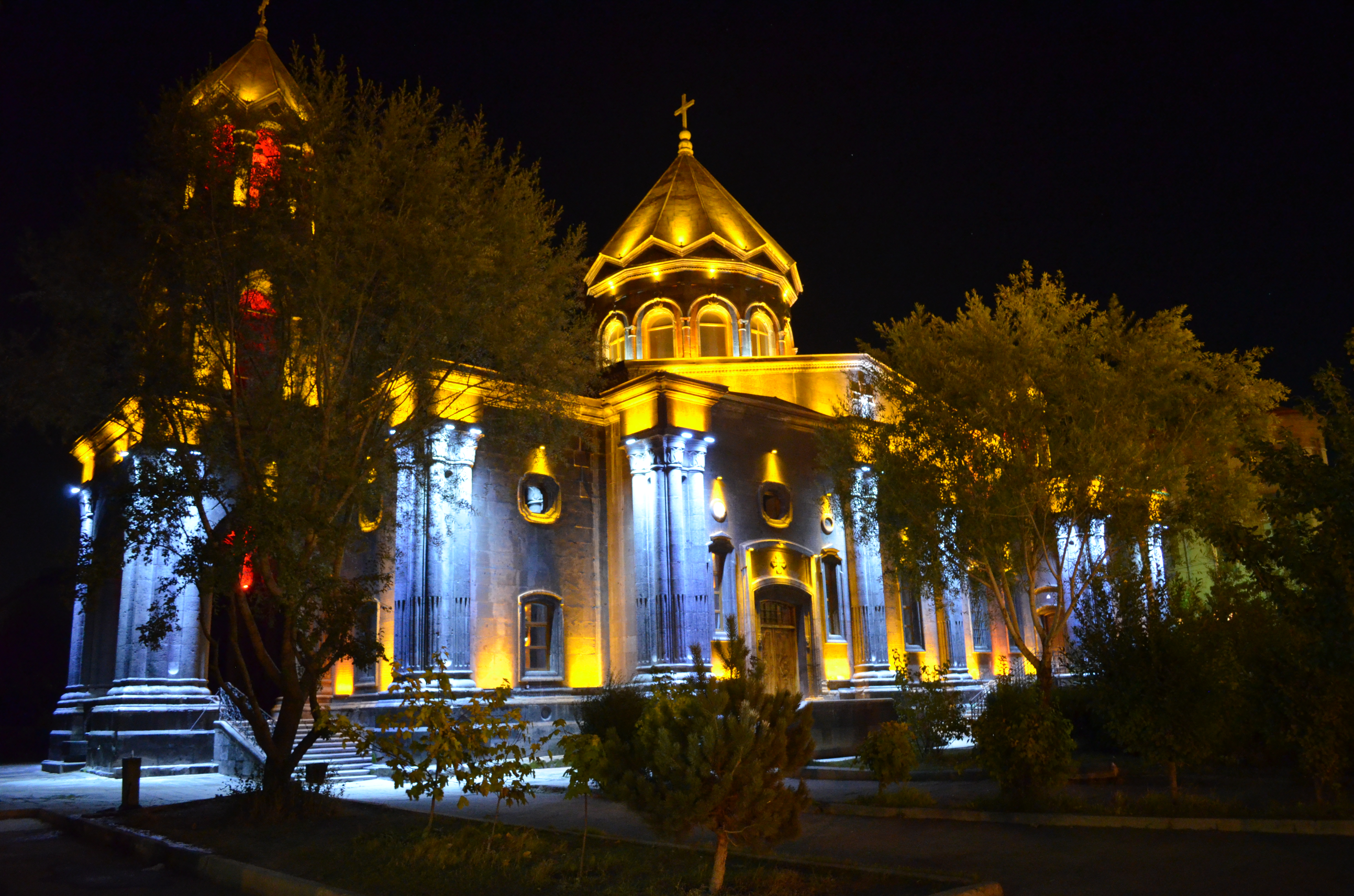 Եկեղեցի Սբ. Աստվածածին («Յոթ վերք») 1/4.870